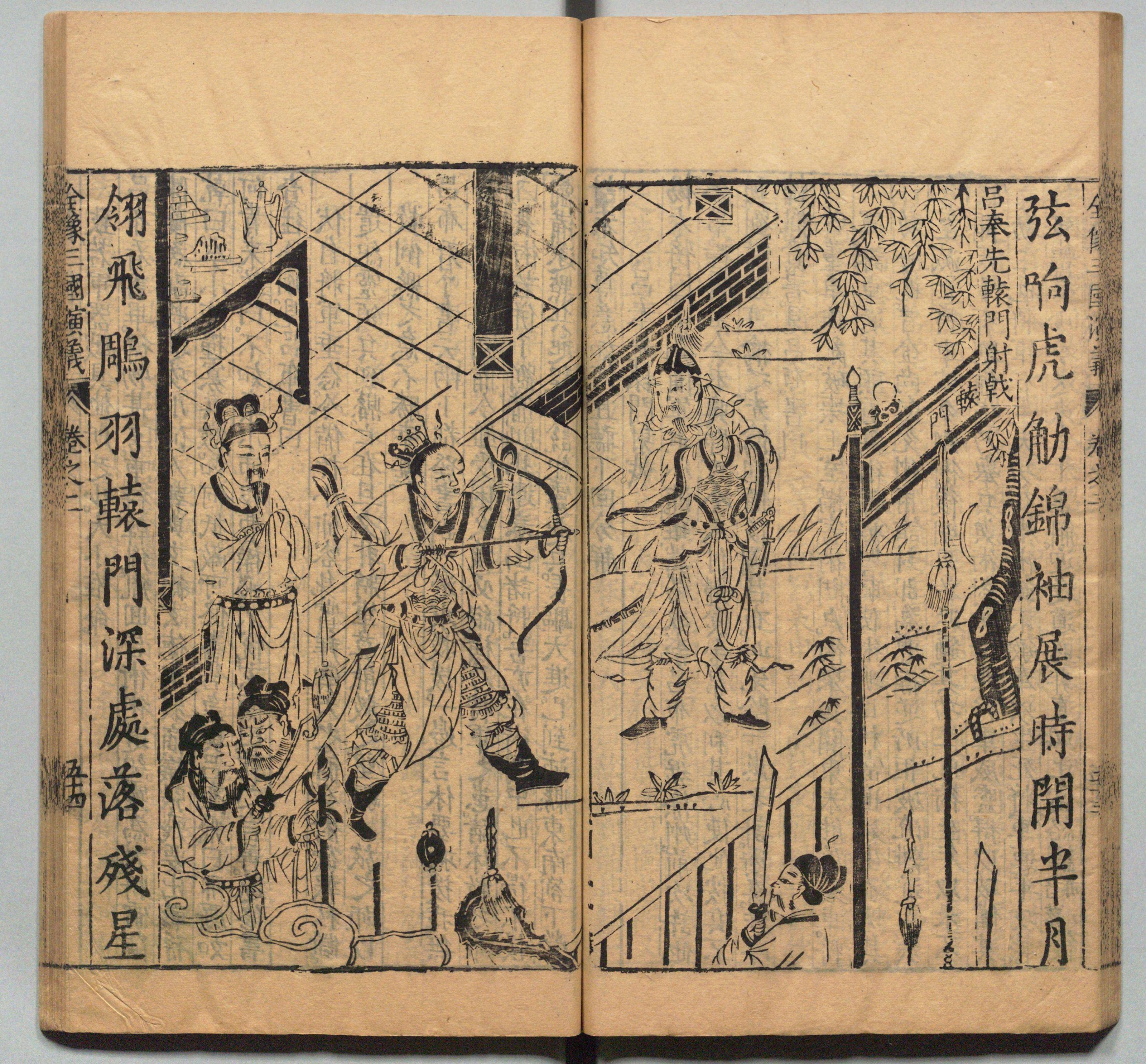 《新刊校正古本大字音释三国志通俗演义》 明万历十九年书林周曰校刊本